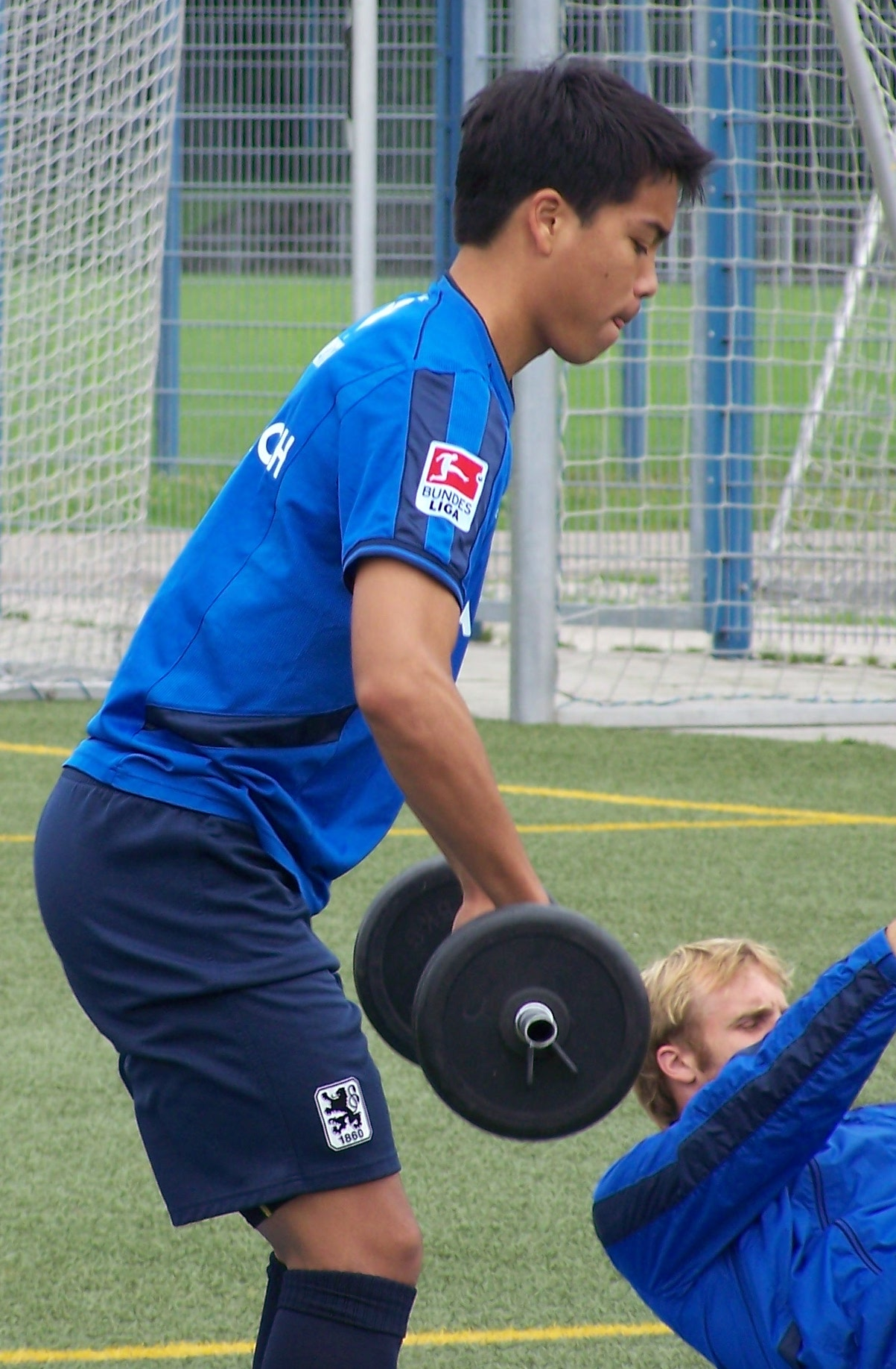 Bobby Wood, 1860 München, Training Grünwalder Straße